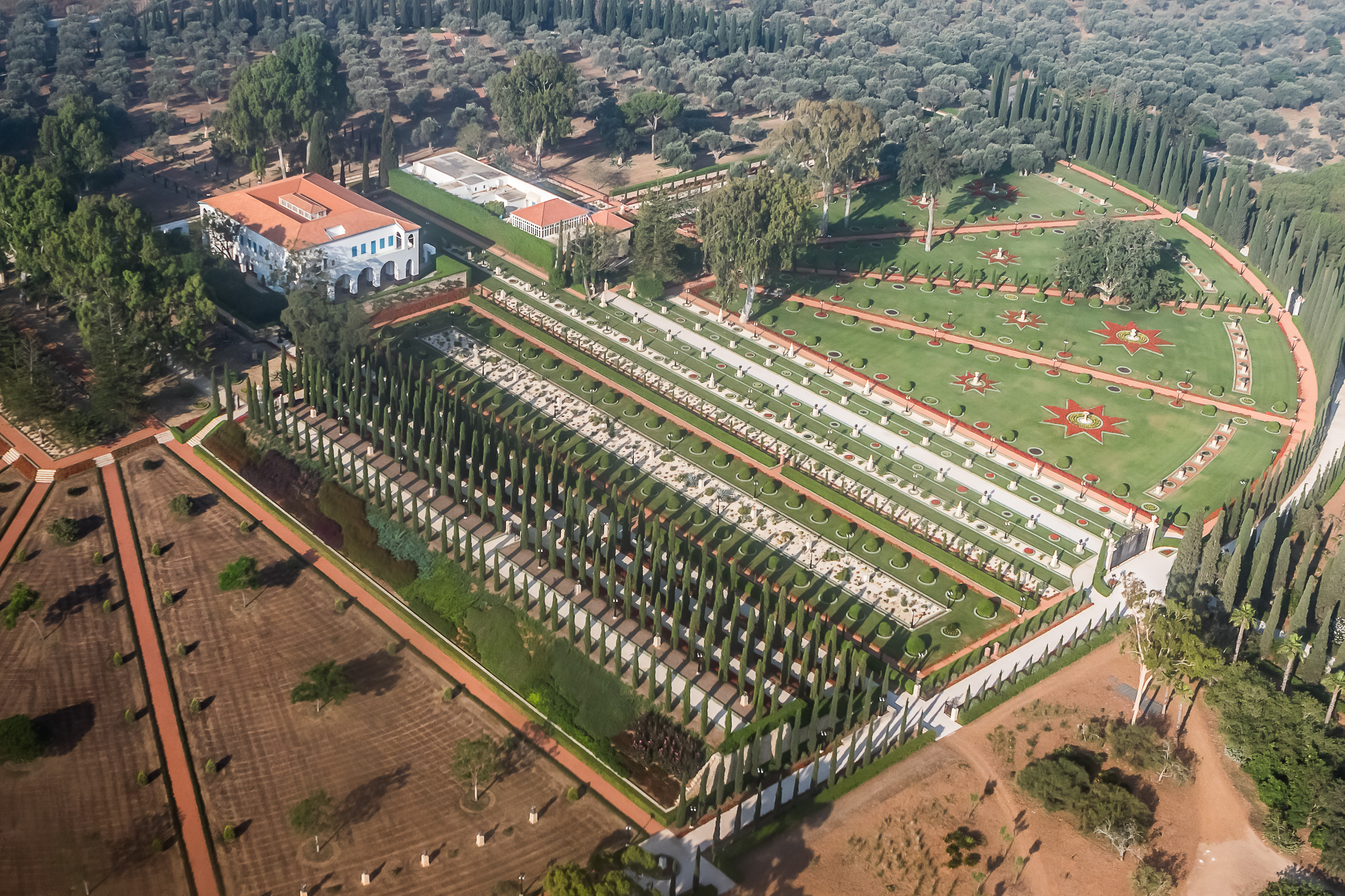 גן רידוואן, היה ידוע בשם "נעמין" כשמו של הנחל בערבית. הוא נשכר על ידי עבדול בהאא עבור אביו, אשר אהב להעביר במקום את זמנו בערוב ימיו. הבהאא אוללה העניק למקום את השם "רידוואן", היינו גן עדן, ונהג לכנותו גם בשמות "ירושלים החדשה" ו"האי הירוק שלנו".